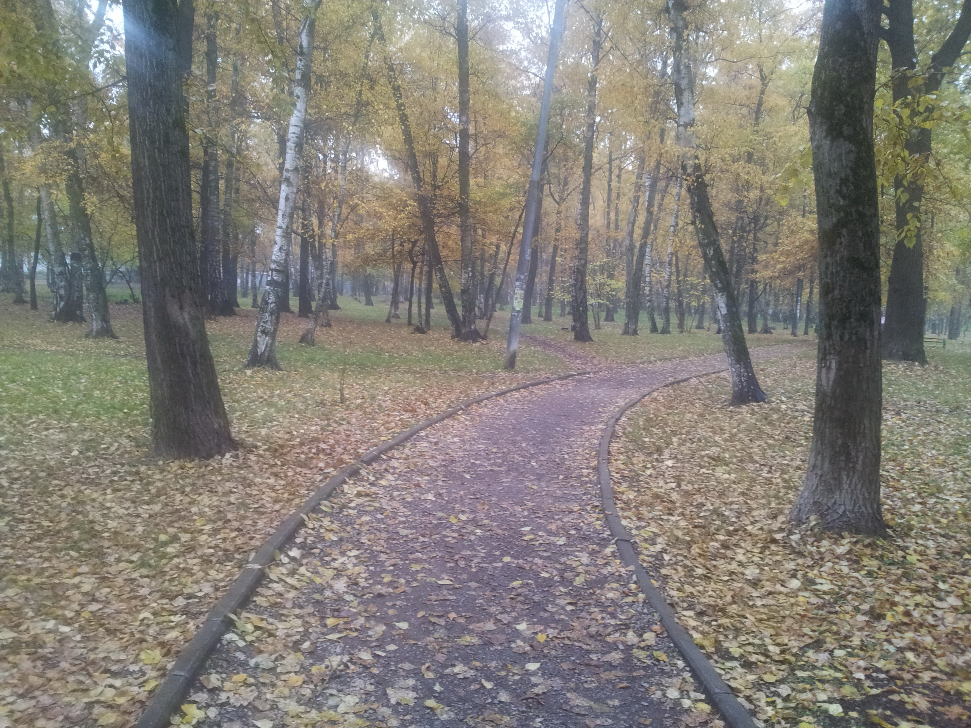 Осень в парке «Вагоноремонт»